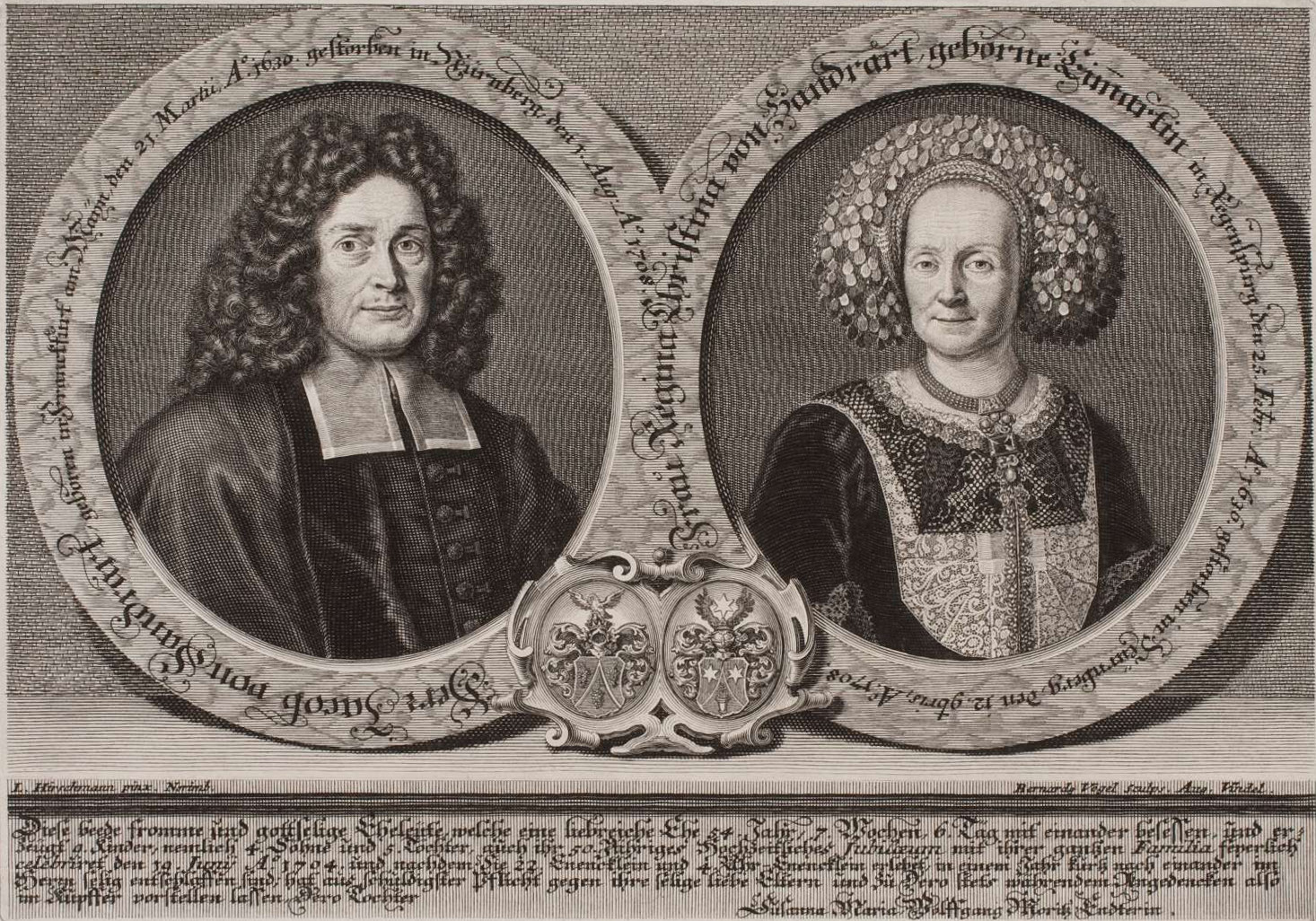 Jacob von Sandrart mit seiner Frau Regina Christina